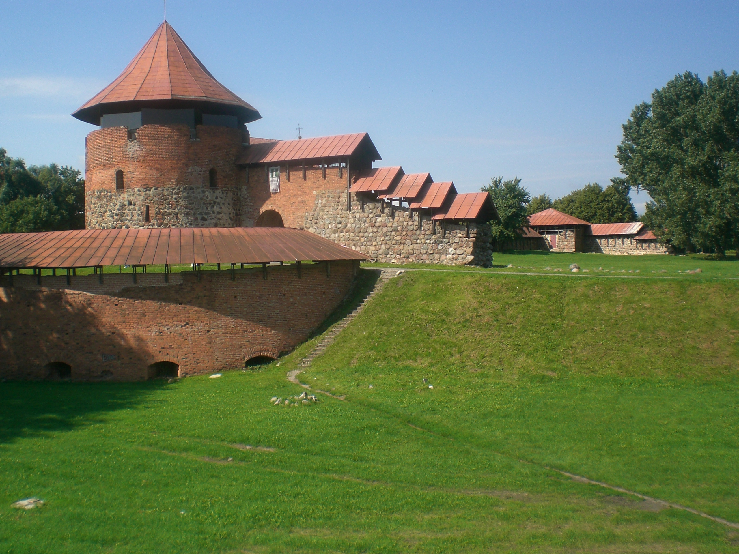 ruino de la mezepoka fortikaĵo de Kaŭno (Kauno pilis), proksime de la historia urbocentro sur la terlango inter la riveroj Nemunas kaj Neris Fonto: propra foto